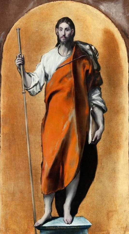 La obra representa al apóstol Santiago el Mayor como peregrino.